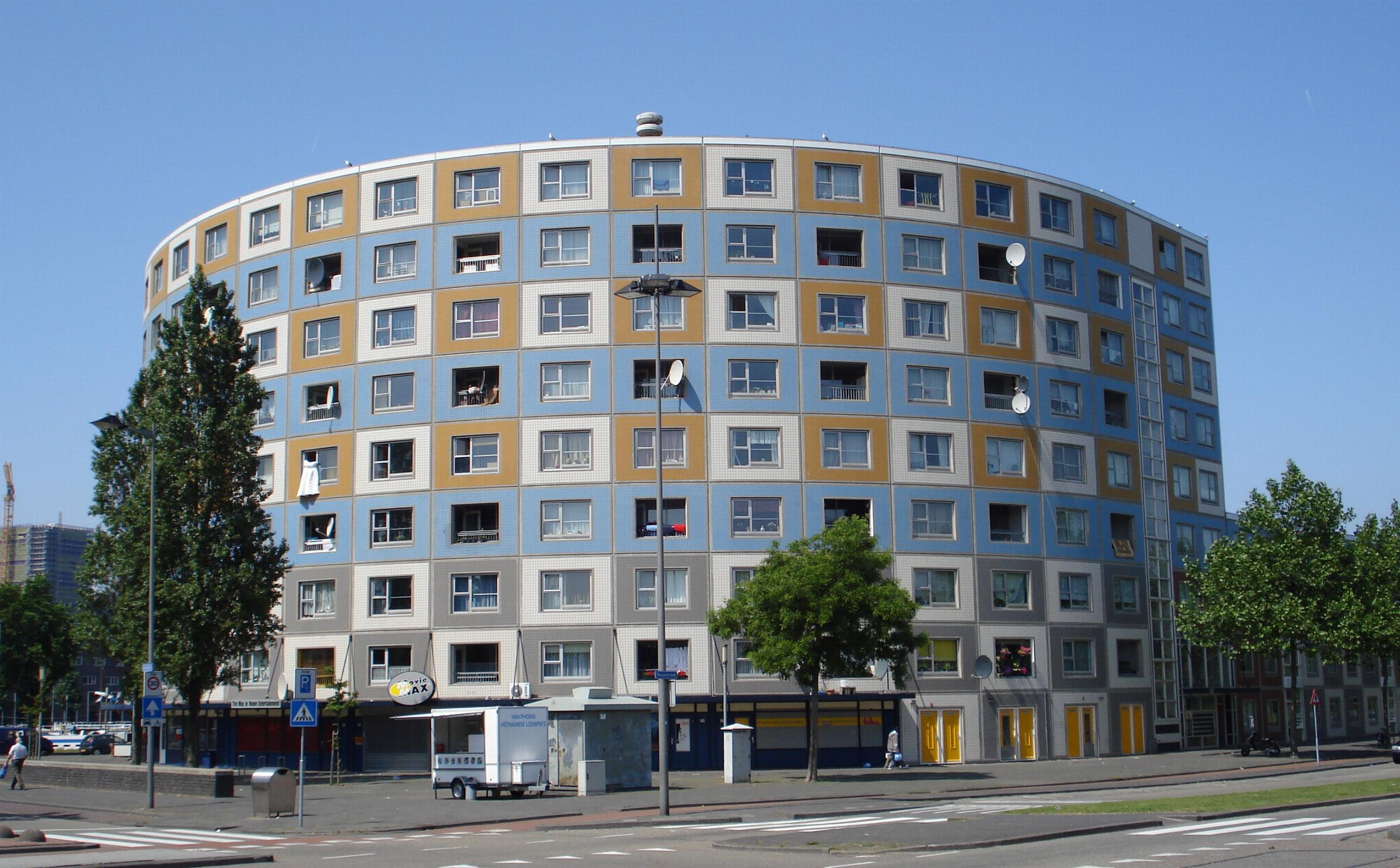 Rotterdam Zuid. Woongebouw de Peperklip.